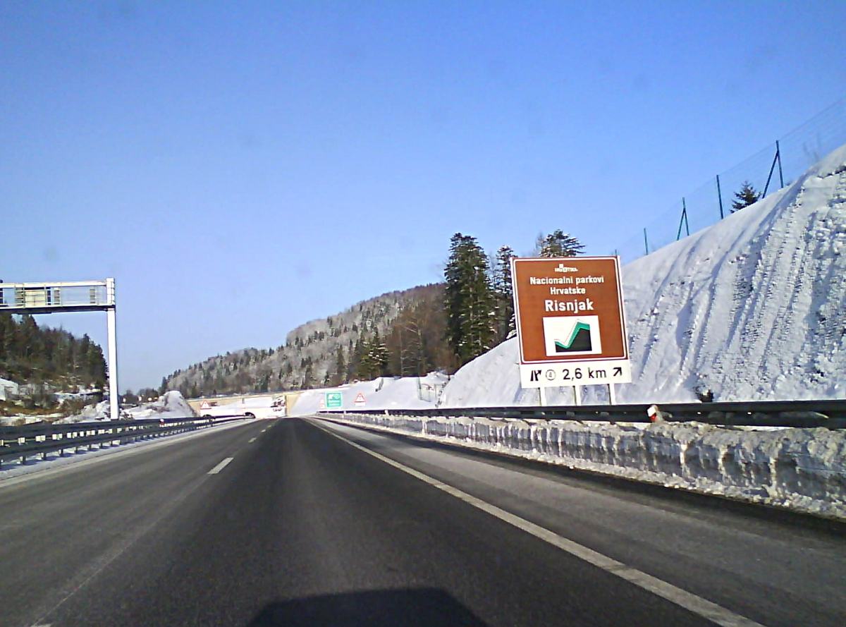 Autocesta A6